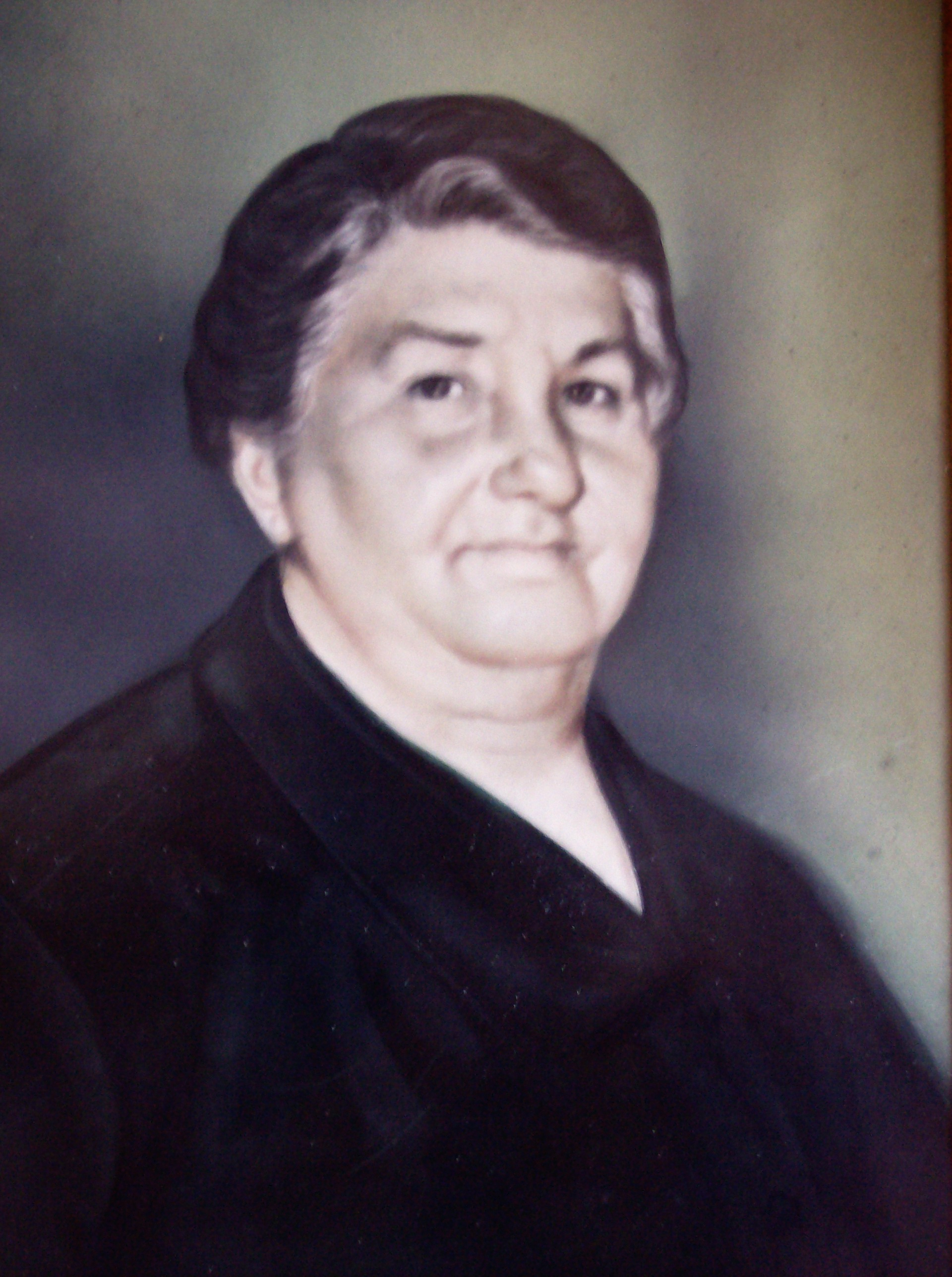 pessoa trajando casaco preto